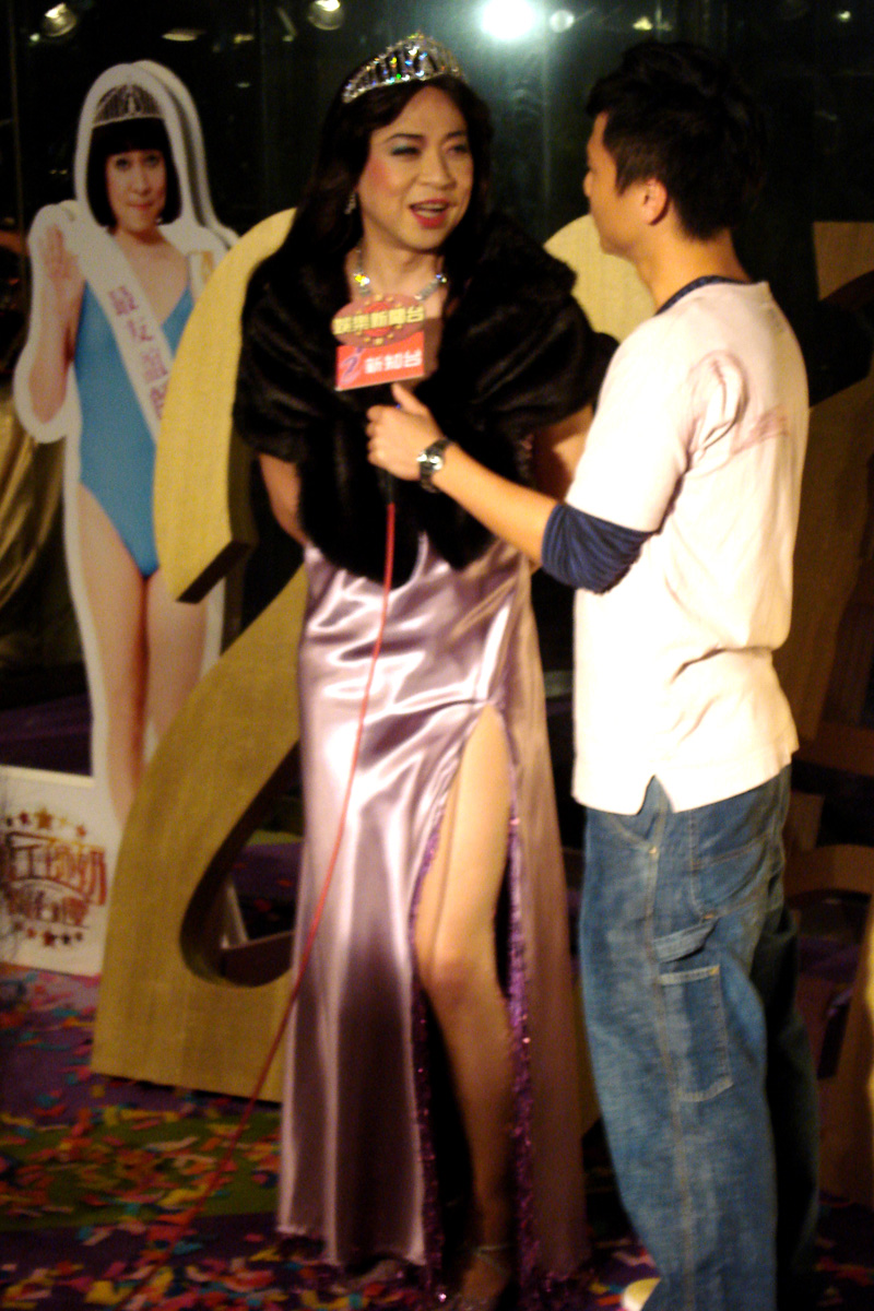 詹瑞文 Bân-lâm-gú: Tsiam Suī-bûn. 詹瑞文